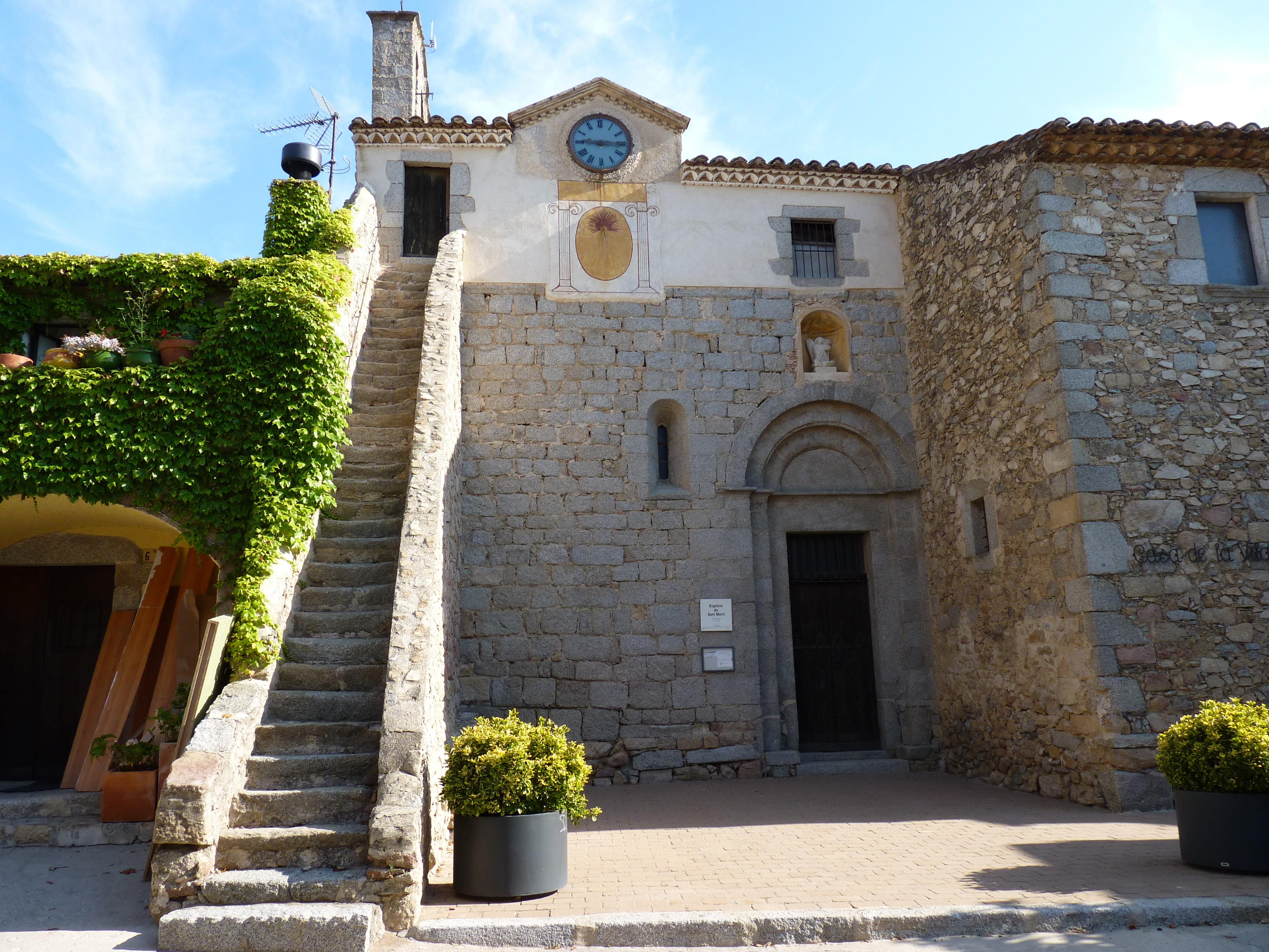 Église Saint Martin, La Vajol (Haut-Ampurdan, Gérone, Catalogne, Espagne)